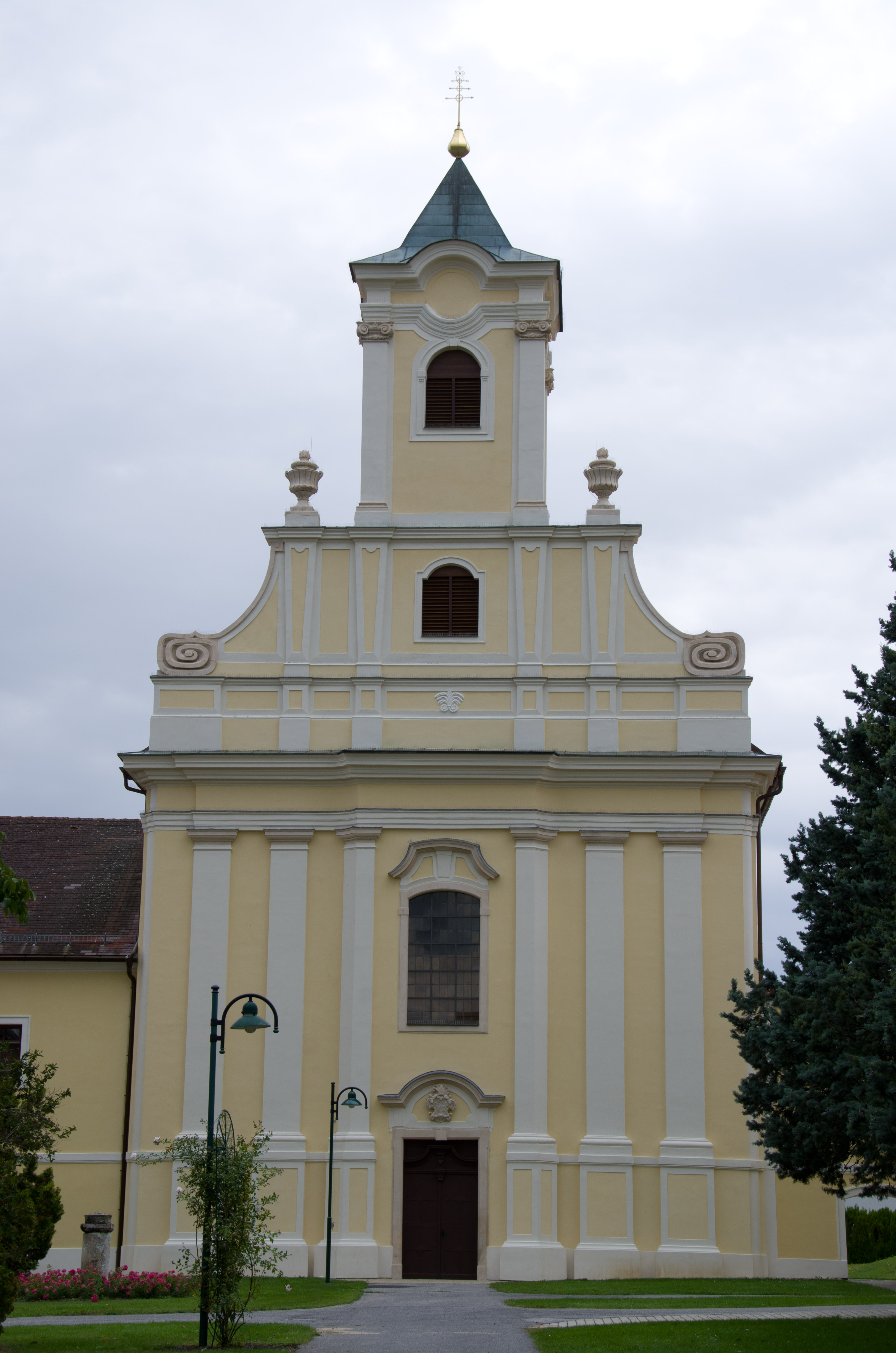 Kath. Pfarrkirche hl. Georg und Mariae Himmelfahrt